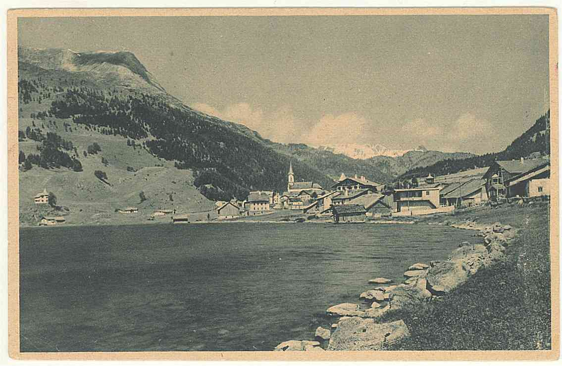 BZ Resia frazione di Curone Venosta panorama con il lago di Resia